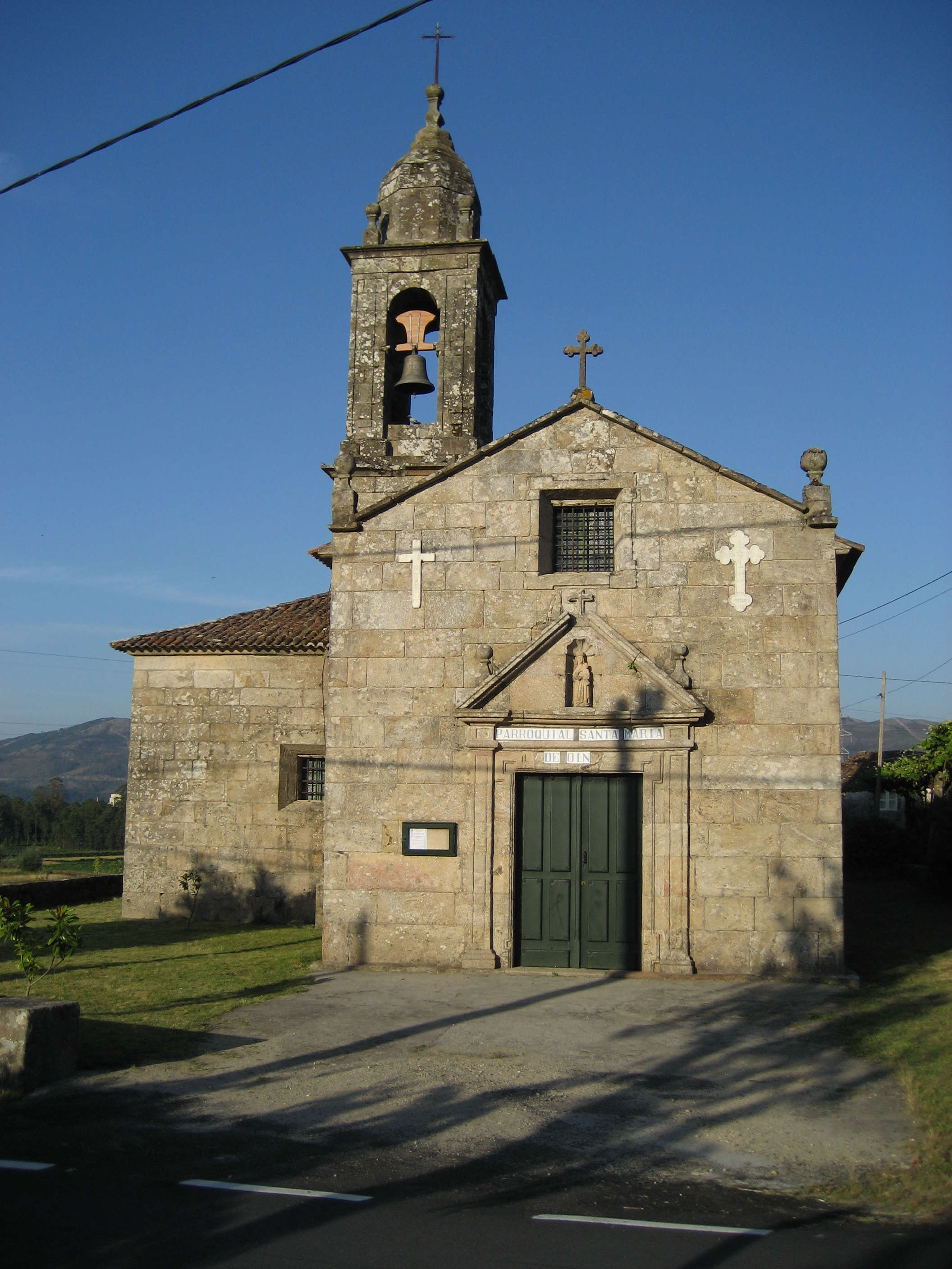 Iglesia de Santa María de Oín, Rois